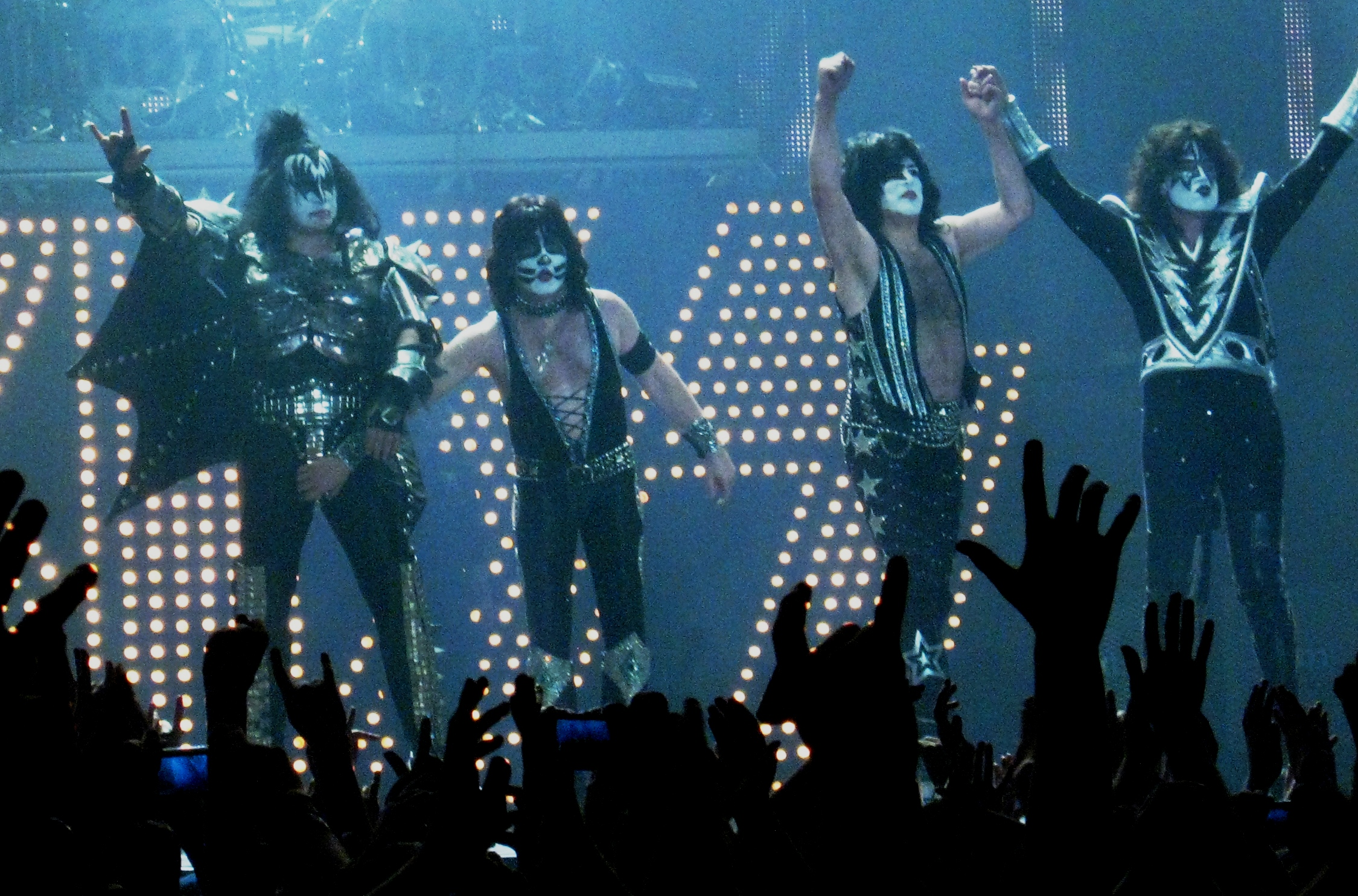 Kiss at LG Arena.